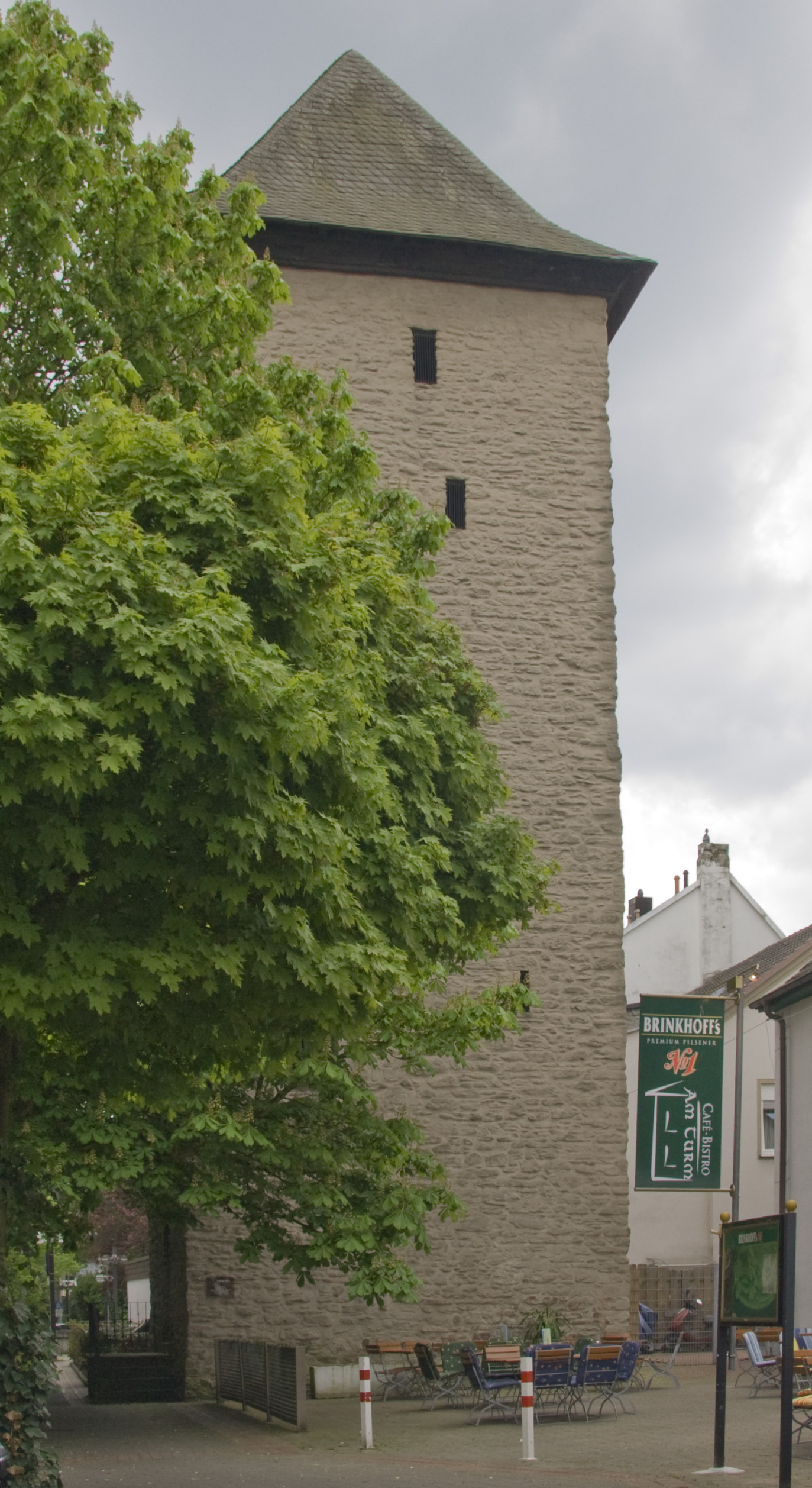 Poenigeturm in Menden. This image shows a heritage building in Germany, located in the North Rhine-Westphalian city Menden (Sauerland) (no. 6).